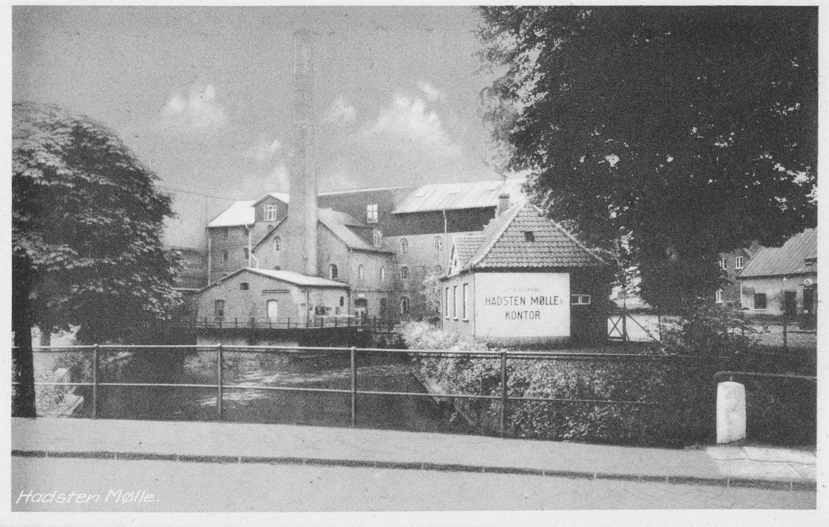 Hadsten Mølle før 1890.